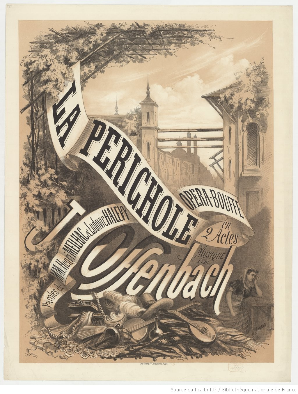 Affiche, ou frontispice de partition, de la première version de La Périchole réalisée par A. Jannin.